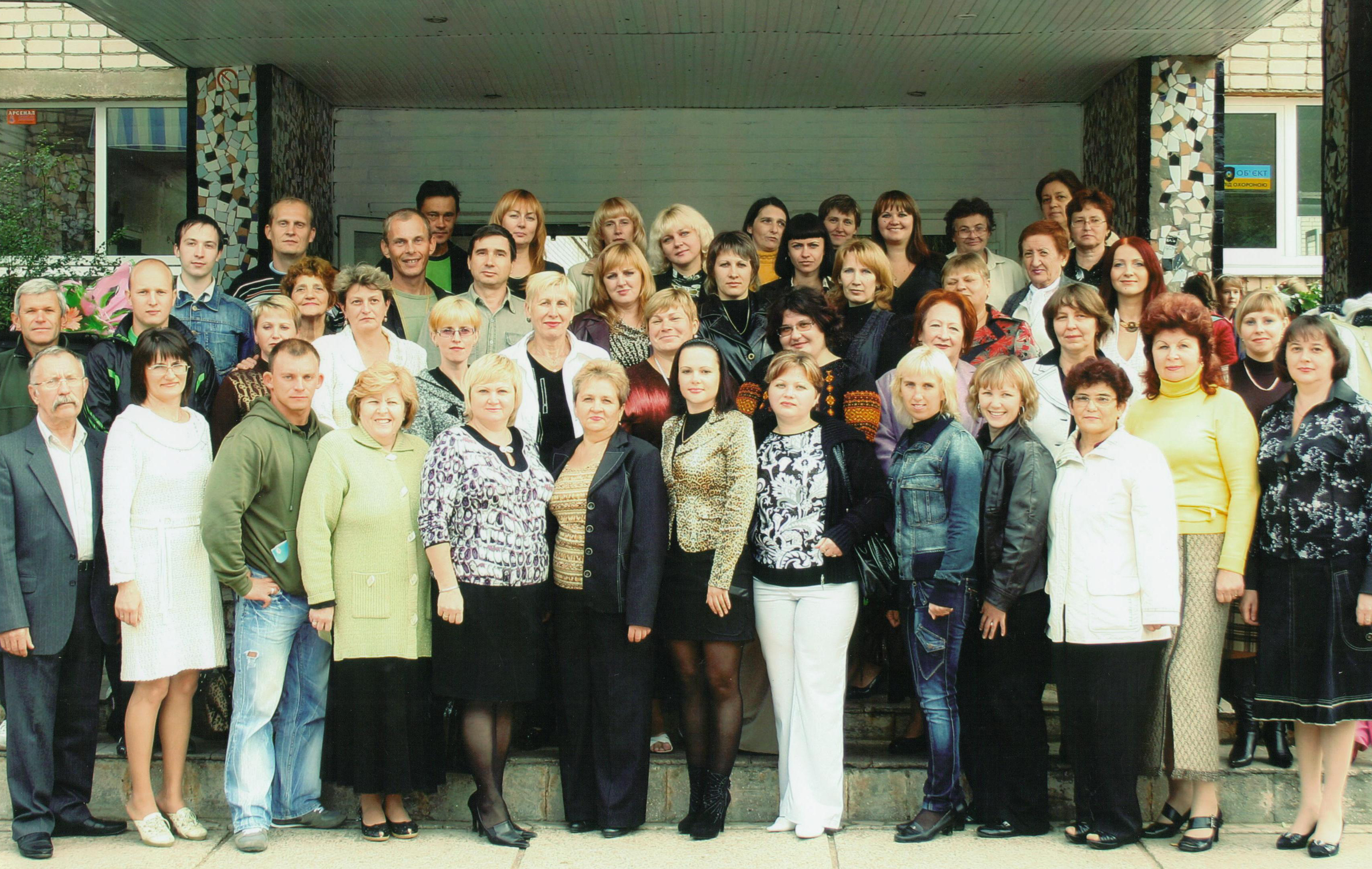 Учителі ОСШ №4